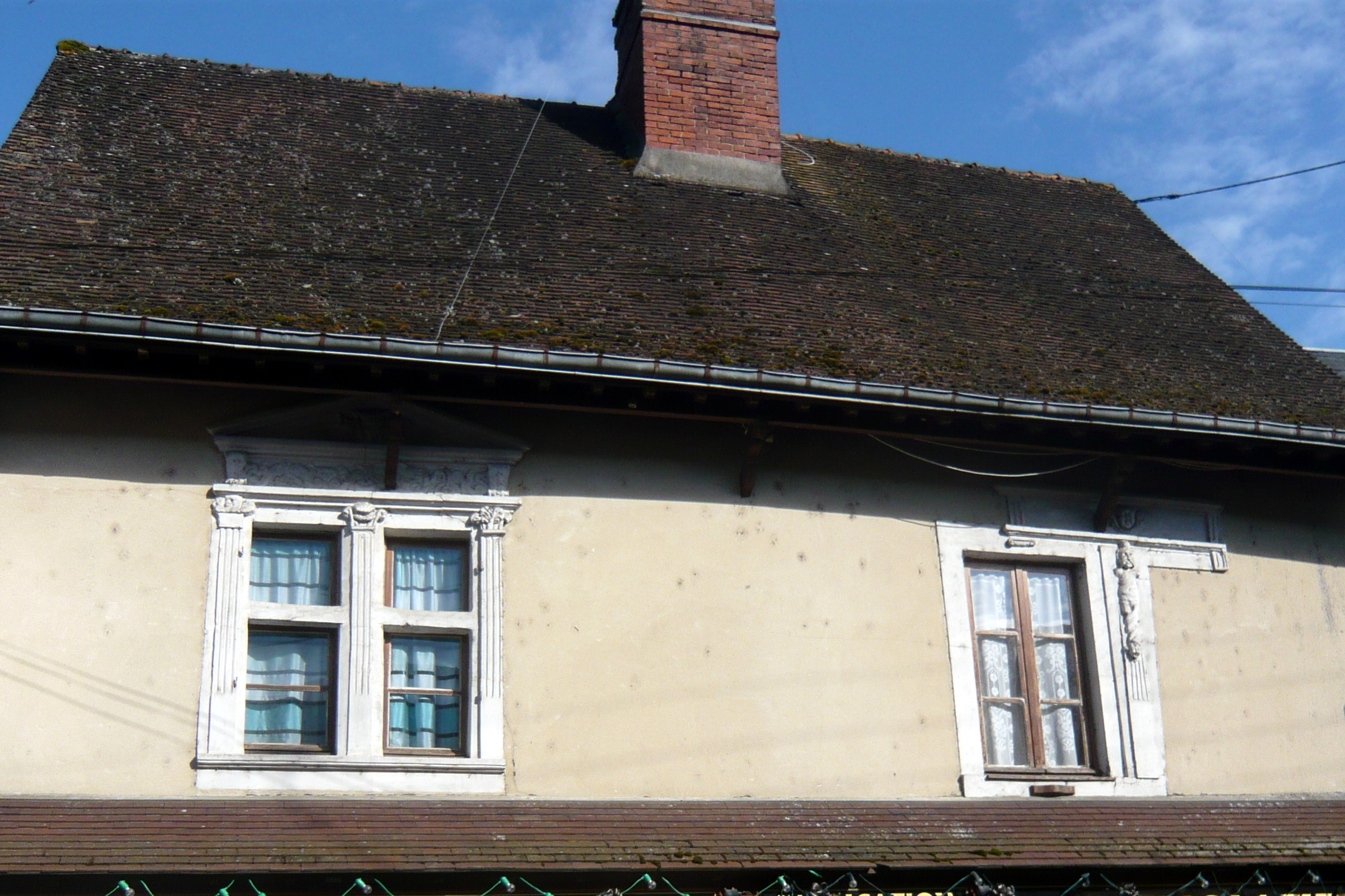 Maison, 11 rue de la République, Saint-Piat, Eure-et-Loir (France).